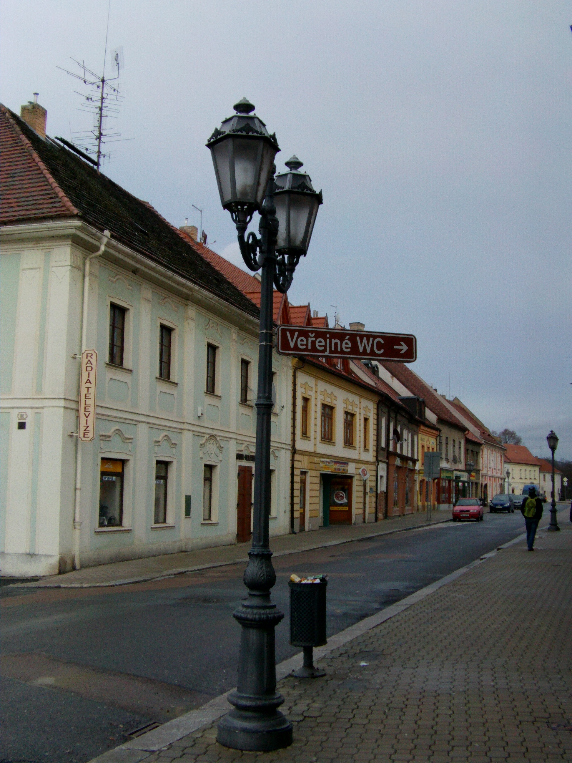 Masarykovo náměstí v Rokycanech